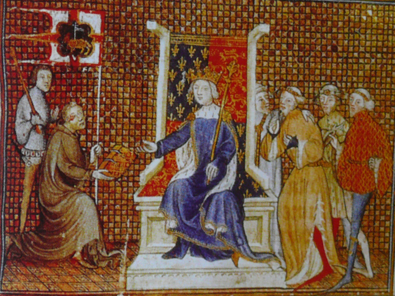 Philippe de Mézières předává Richardovi II. svou knihu